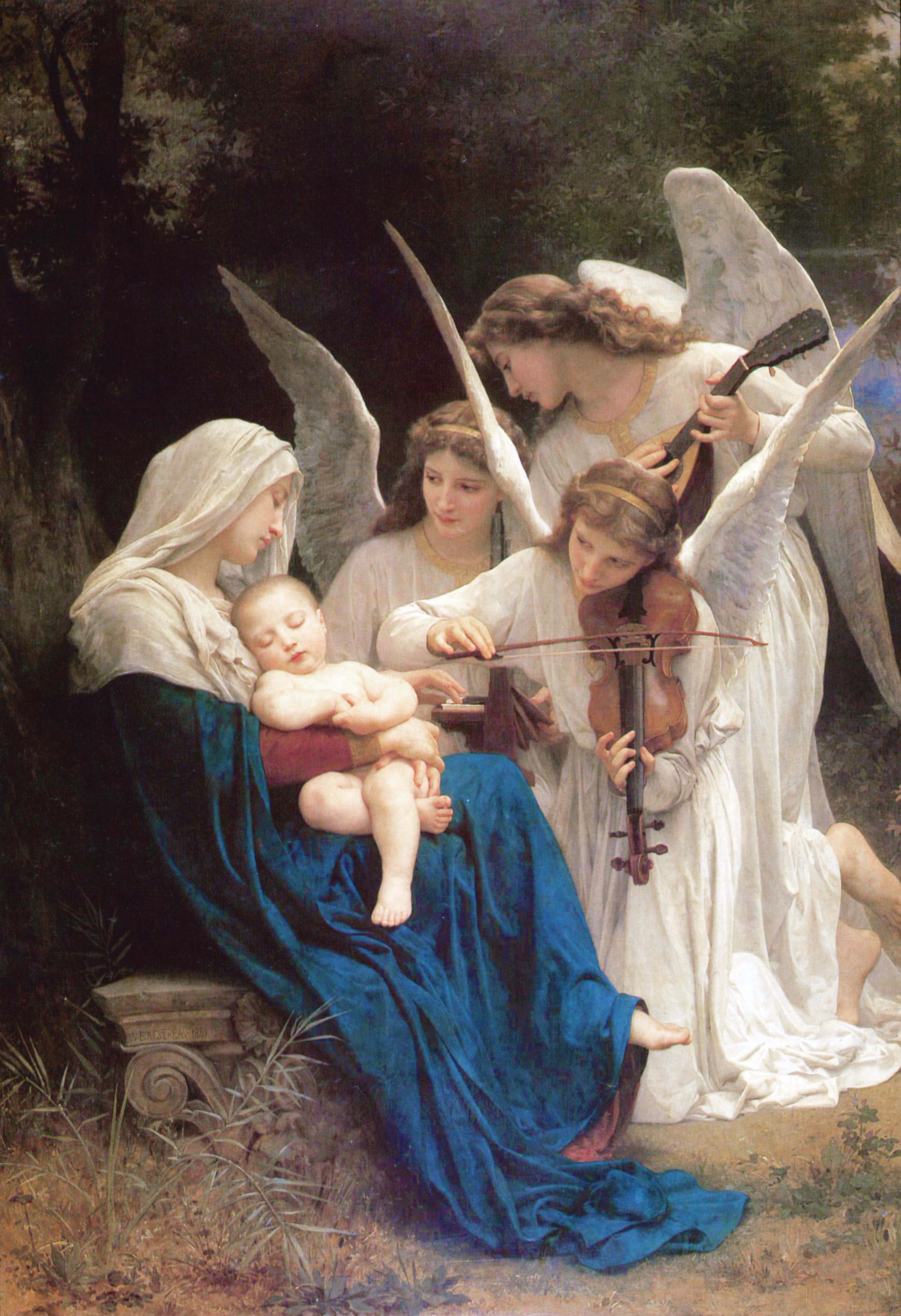 نقاشی آواز فرشتگان که در سال ۱۸۸۱ (میلادی) توسط ویلیام-آدولف بوگرو کشیده شده است. او یکی از نقاشان آکادمیک فرانسه بود.